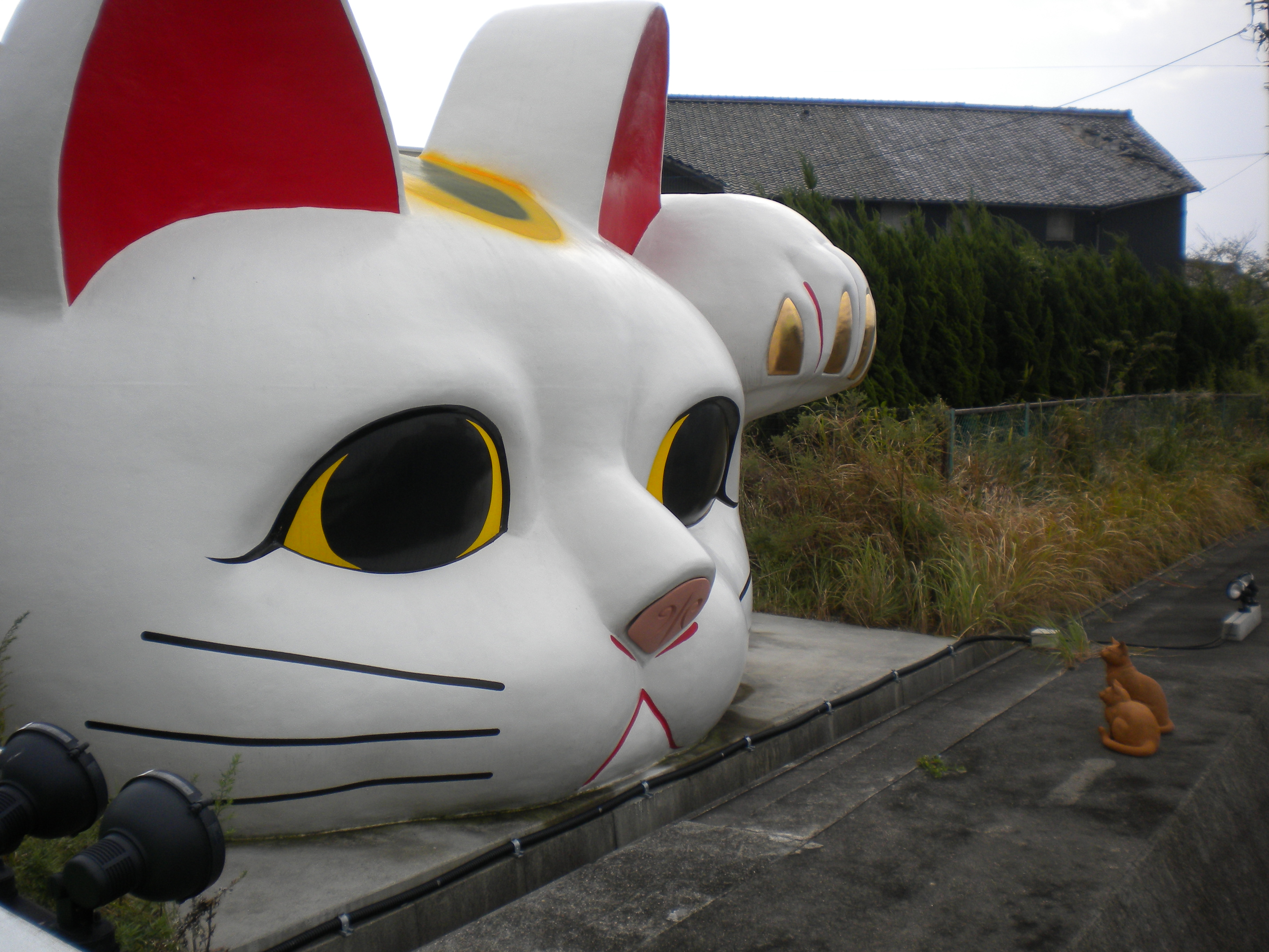 愛知県常滑市のやきもの散歩道にある招き猫「とこにゃん」。